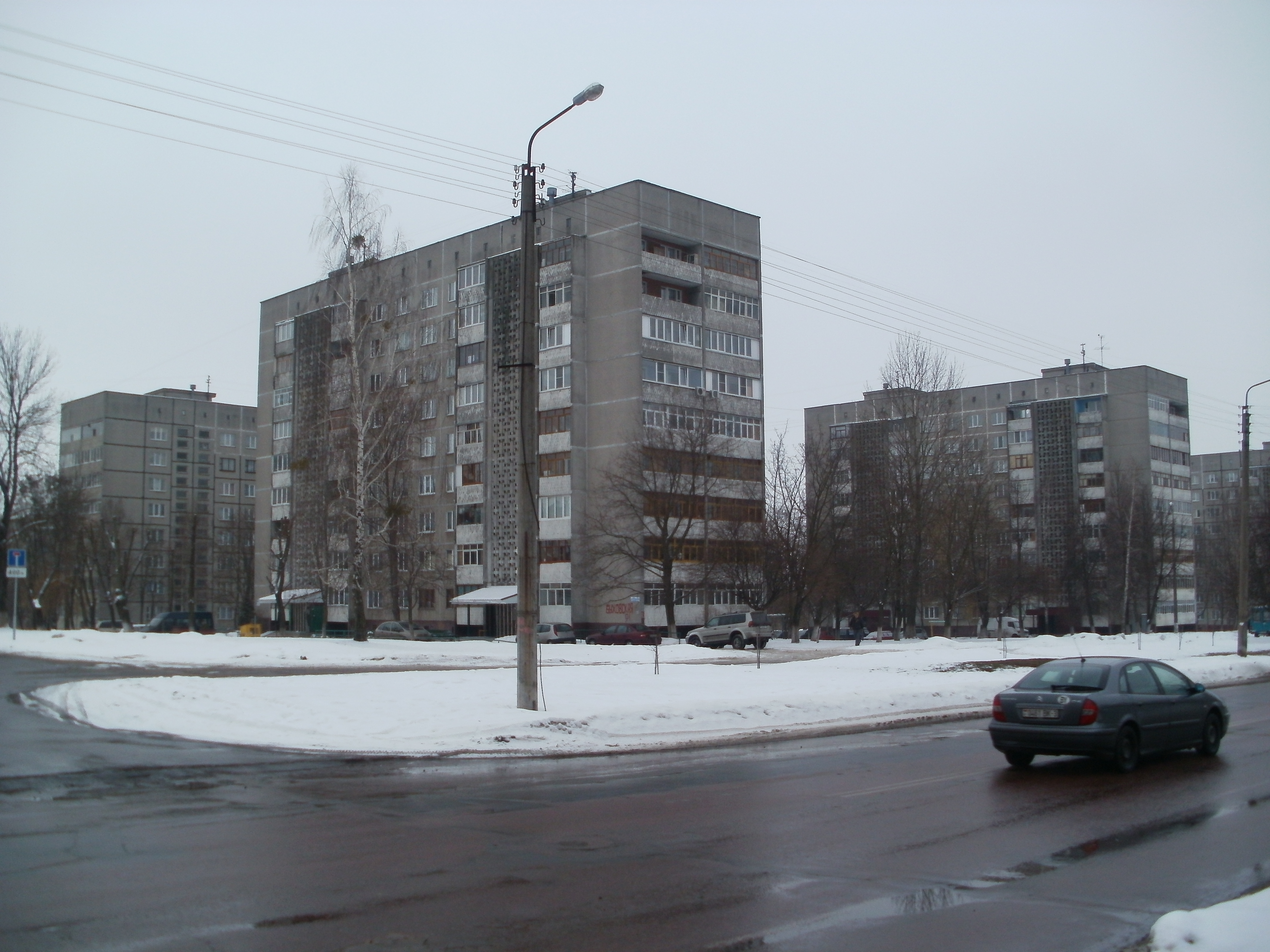 Беларуская (тарашкевіца): Вуліца Быхаўская, Гомель